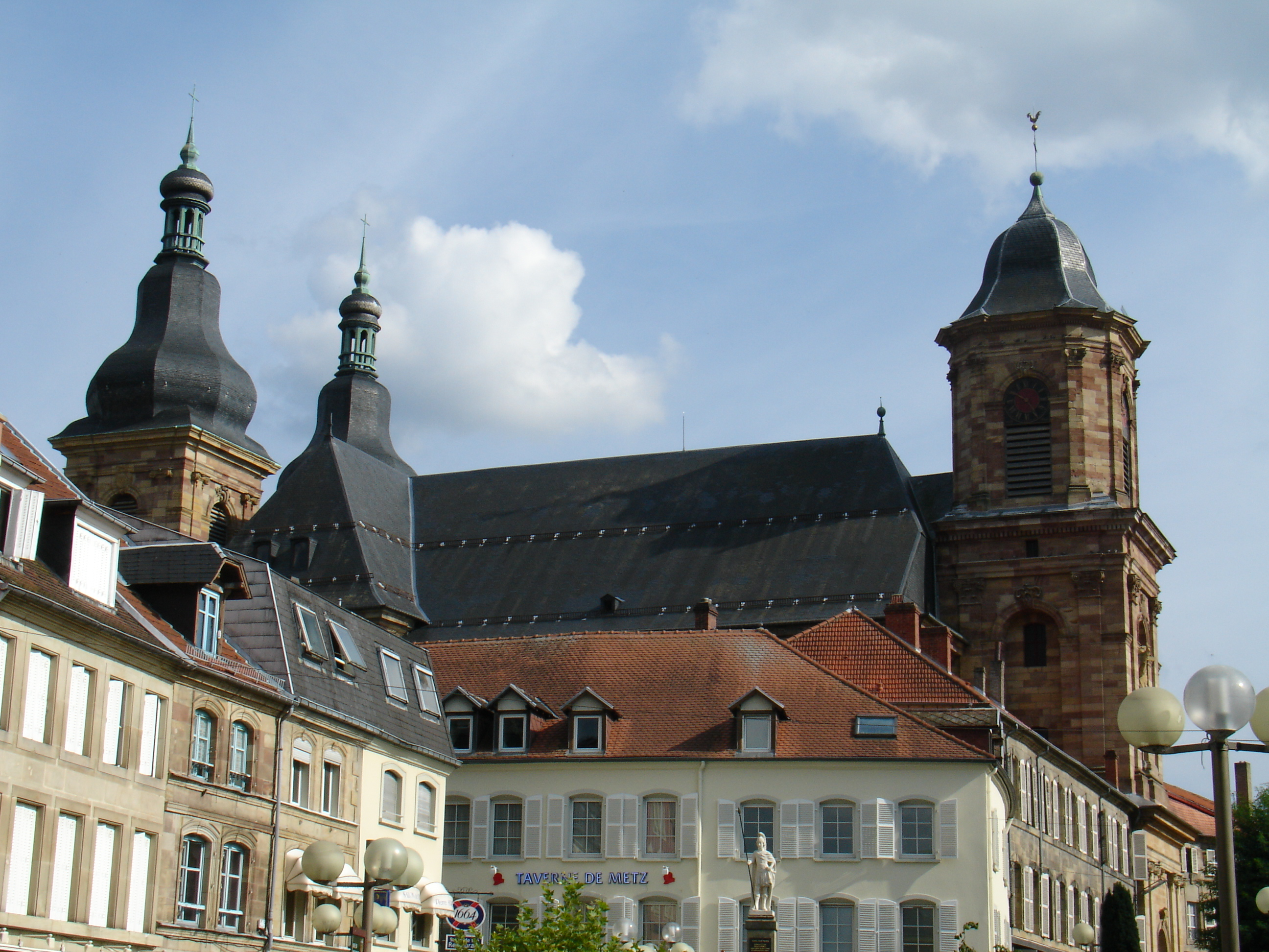 L'Abbatiale Saint-Nabor de Saint-Avold.